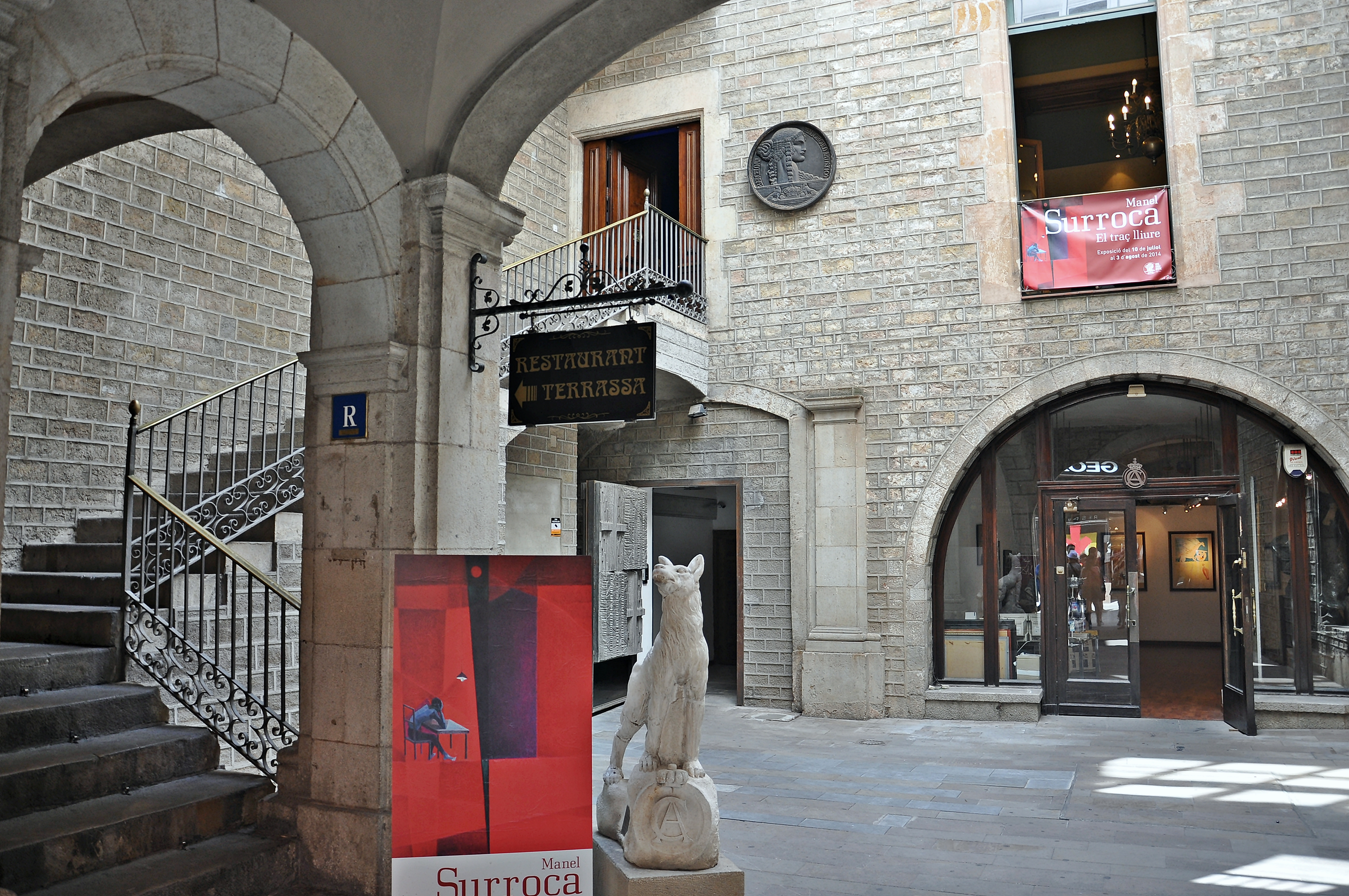 entrada al cercle artistic de barcelona-2014